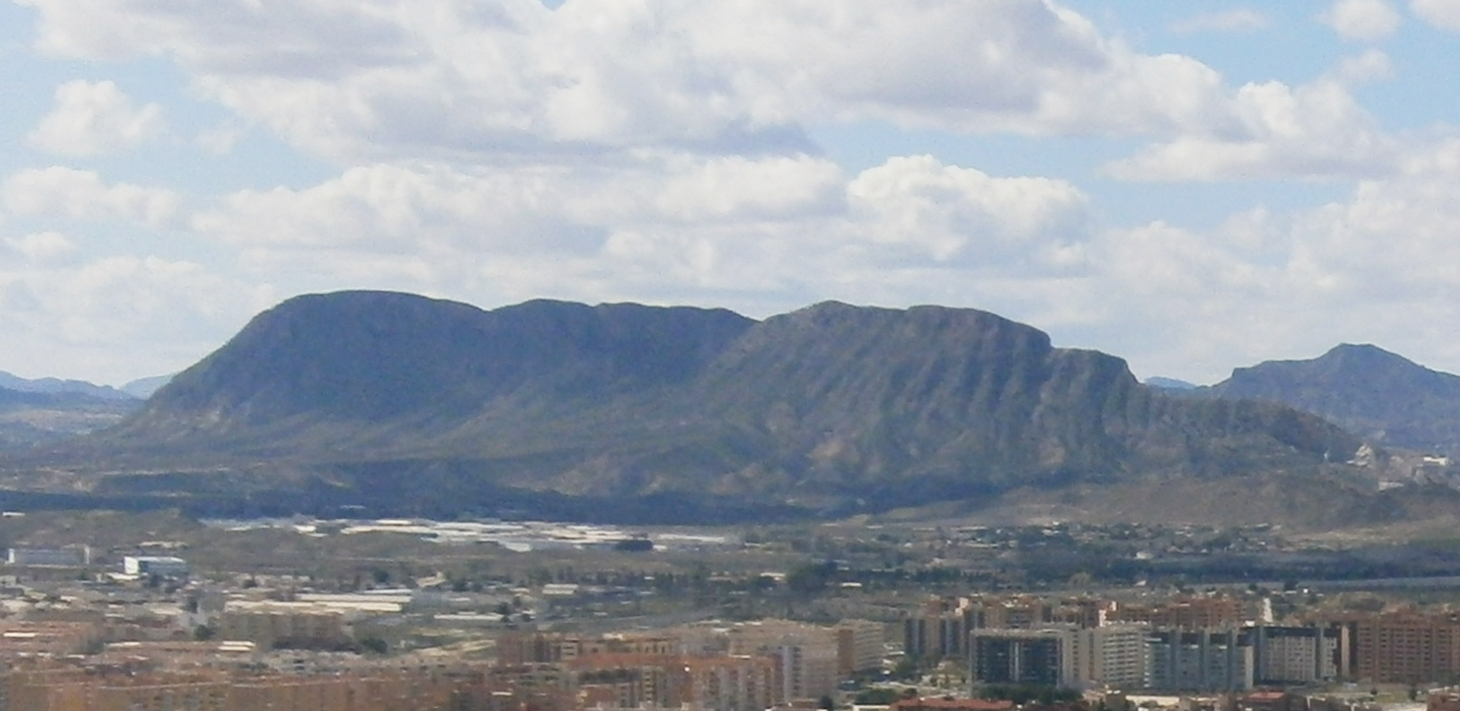 Vista de la sierra de Fontcalent desde el castillo de Santa Bárbara, Alicante, España.